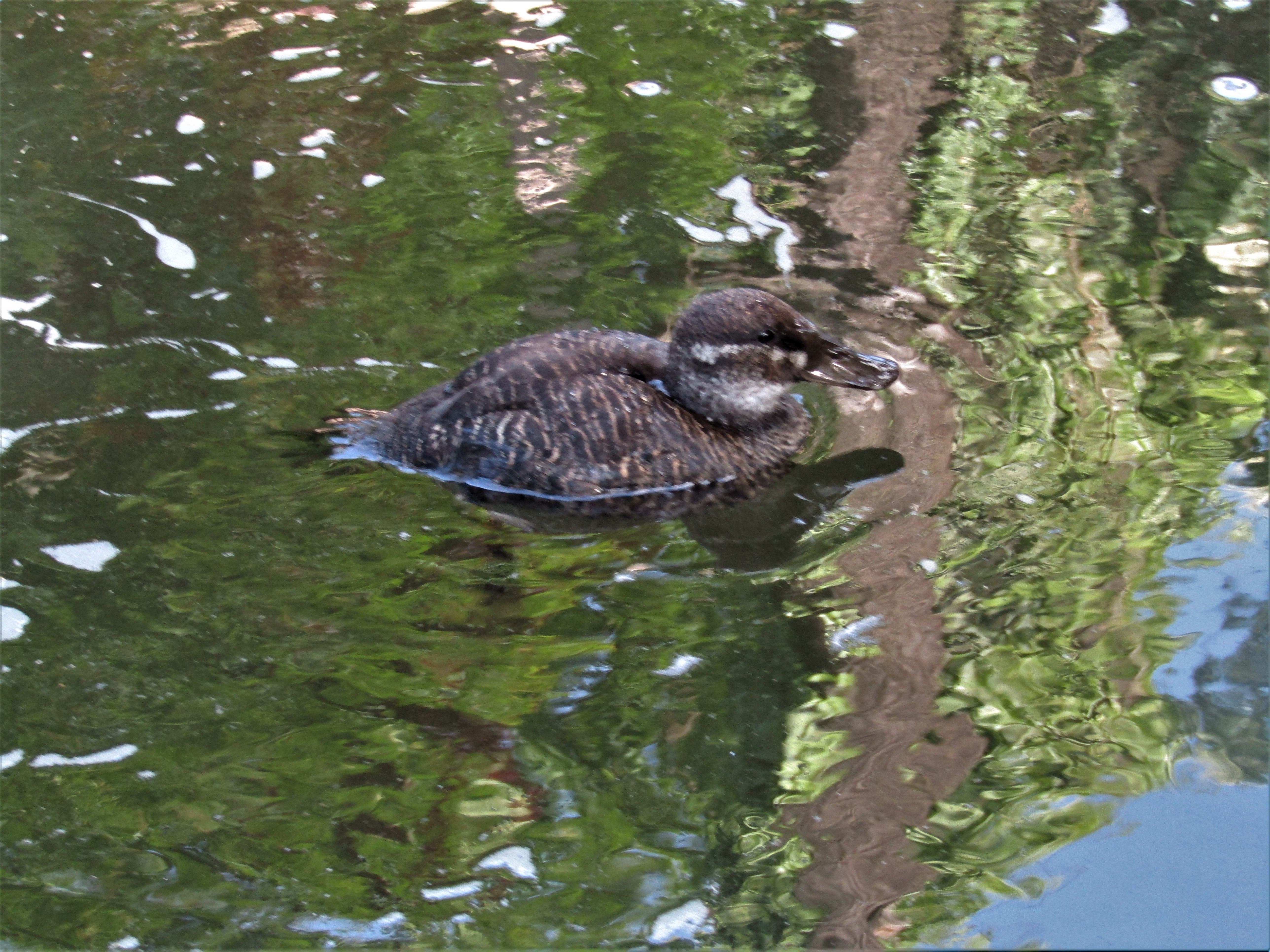 eine Argentinische Ruderente (Oxyura vittata) im Zoo Halle